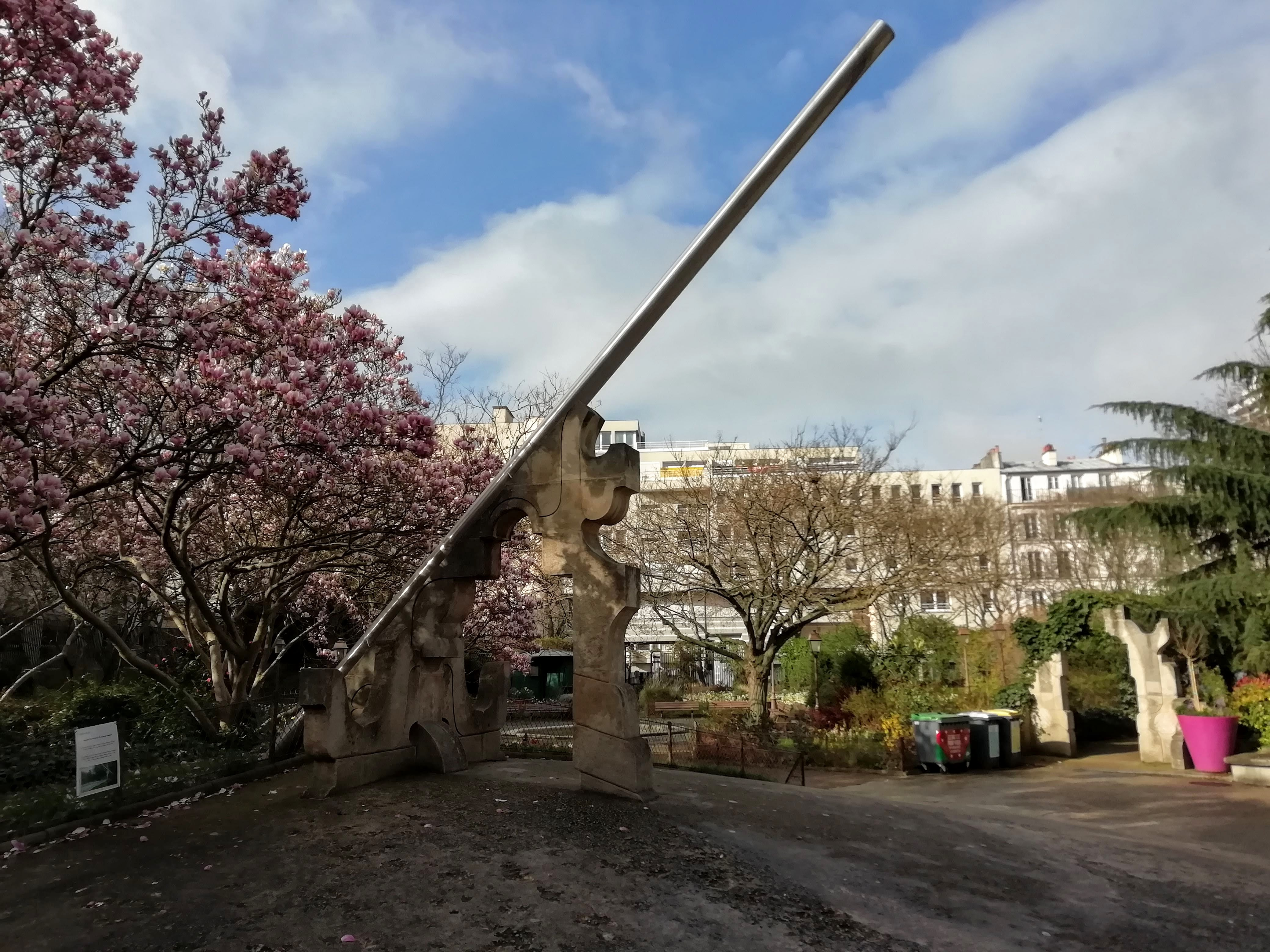 Cadran solaire dans le jardin Émile Gallé, Paris 11